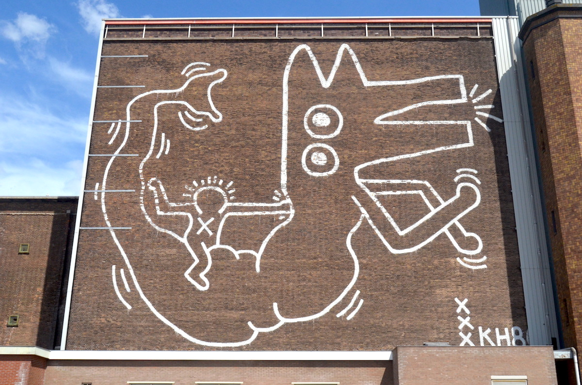 Keith Haring op de Centrale Markthallen te Amsterdam (1); juni 2019. Foto: Erik Swierstra.